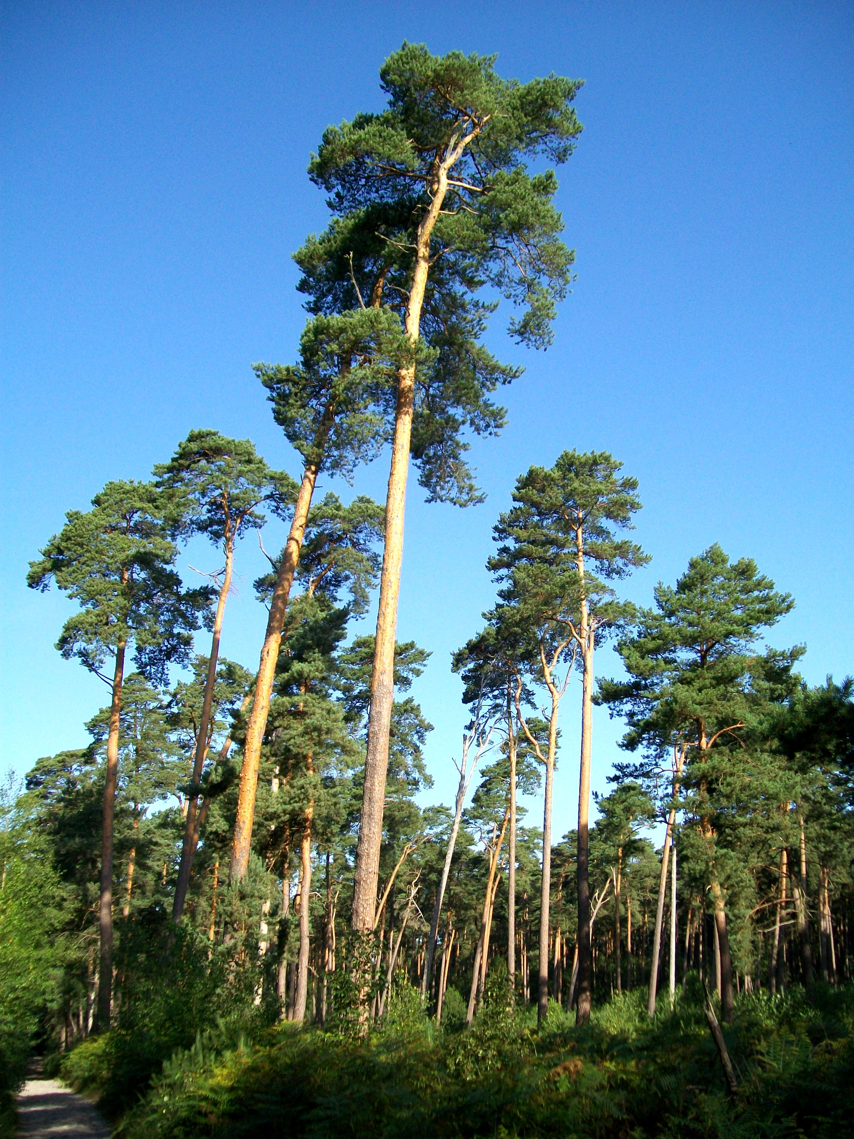 Taillis sous futaie de pins sylvestres à l'extrémité ouest de la forêt domaniale; cette forme de gestion forestière fait exception en forêt d'Ermenonville.